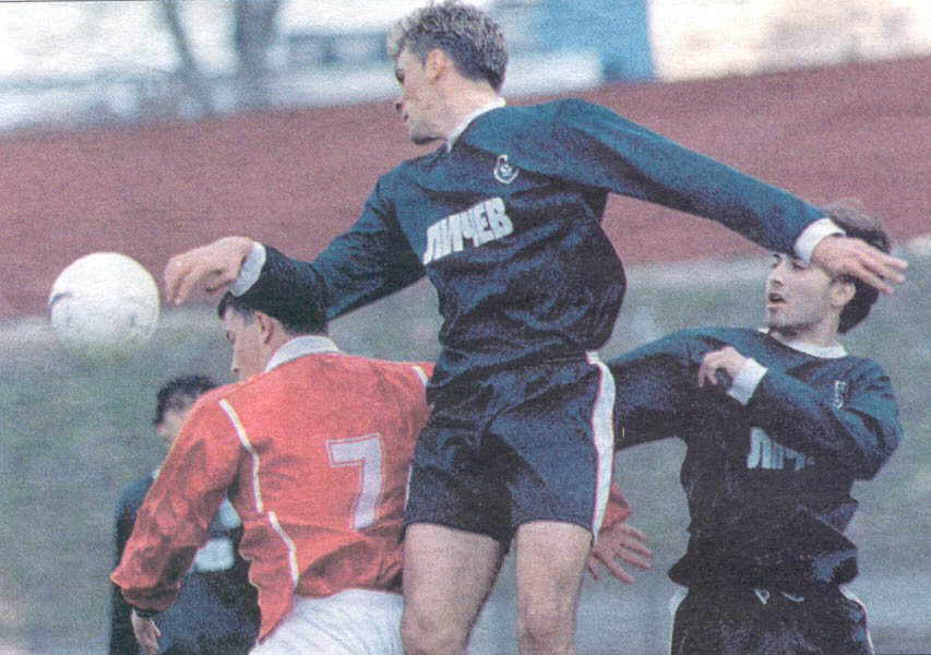 Валентин Илиев с екипа на ФК Ботев Враца